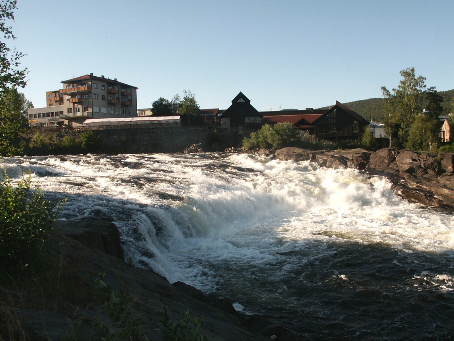 River Lågen at Kongsberg, Nor